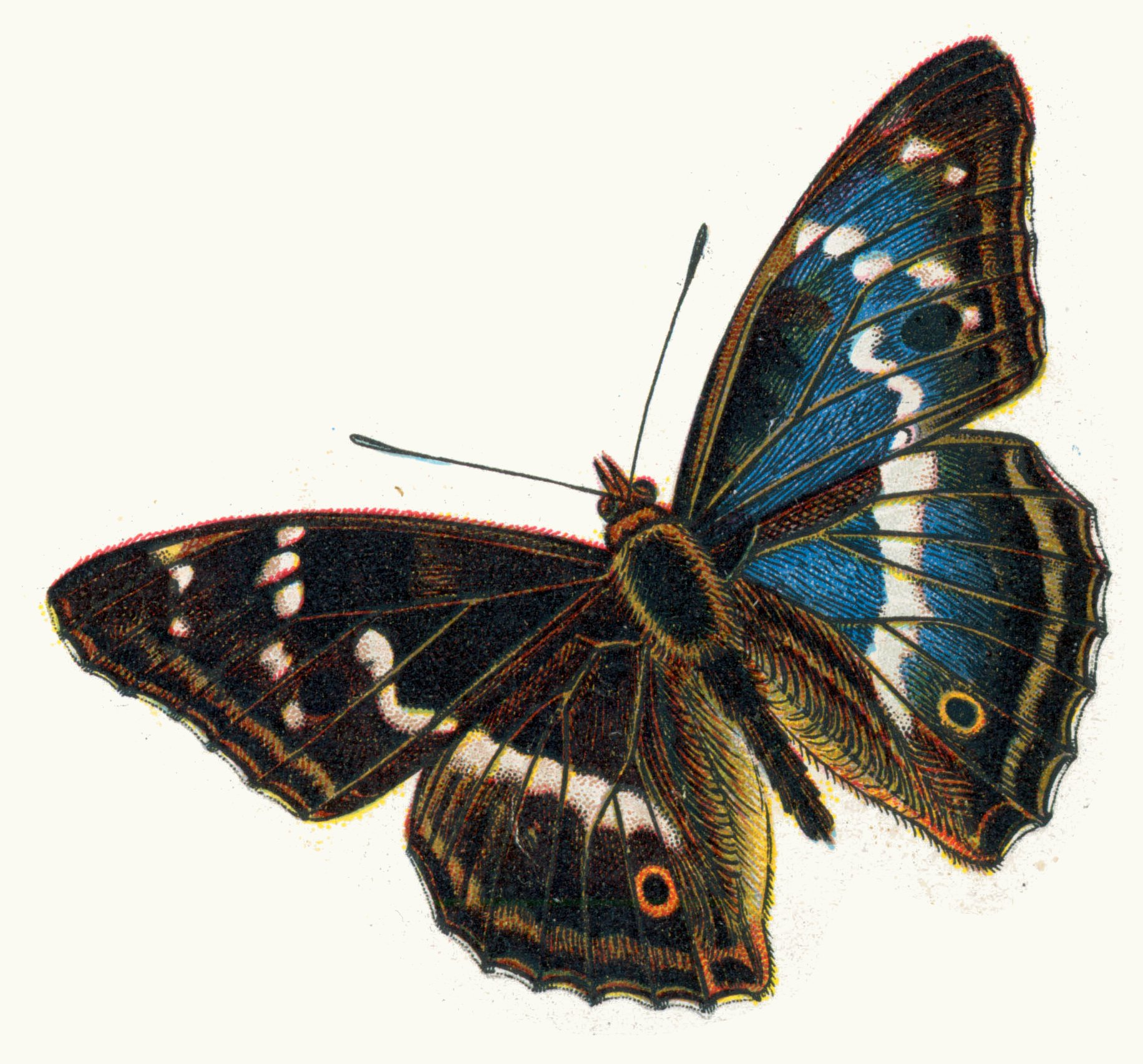 Apatura iris male